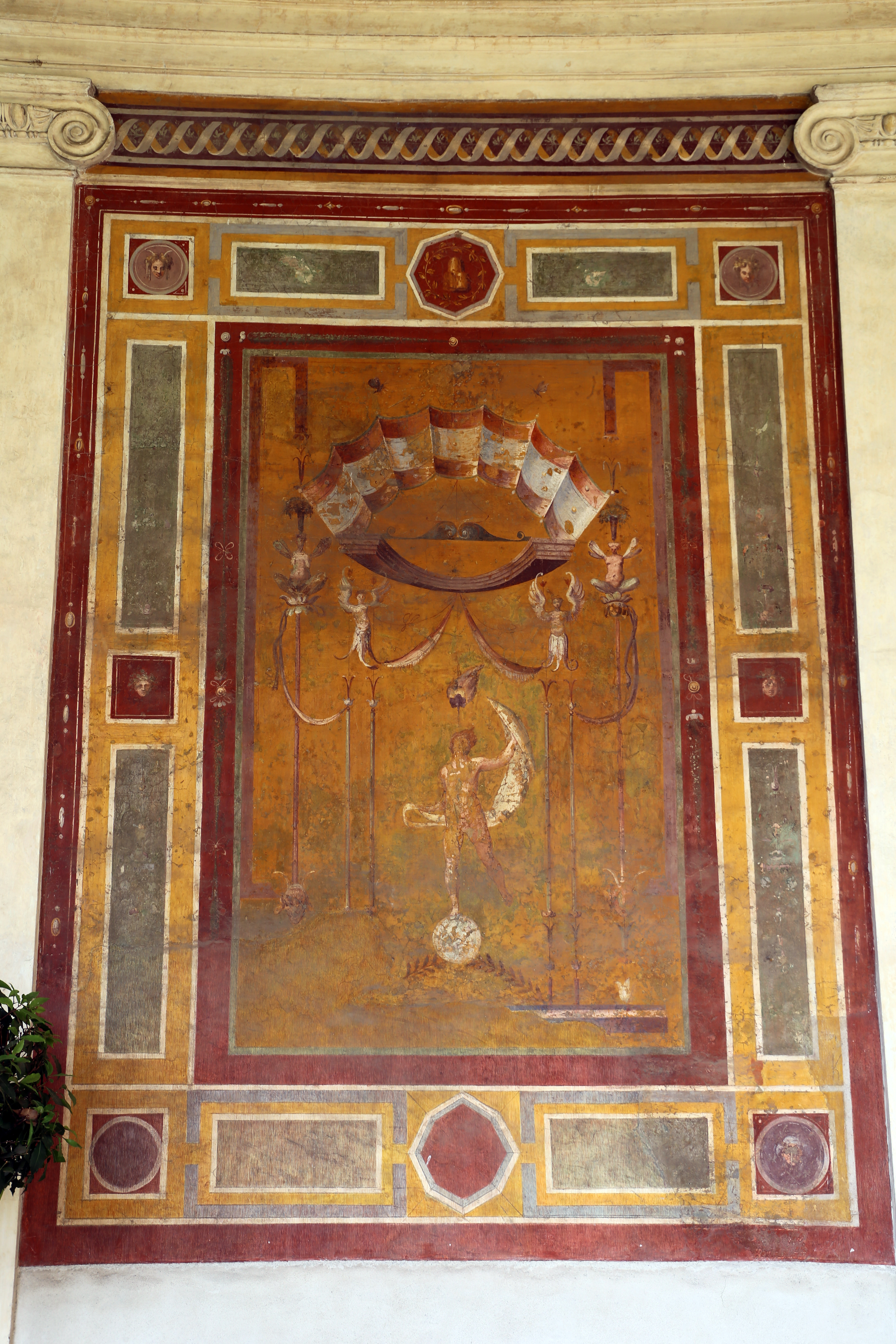 Villa Giulia (Rome) This is a photo of a monument which is part of cultural heritage of Italy.